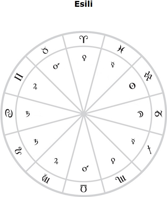 Esili dei pianeti secondo l'astrologia occidentale